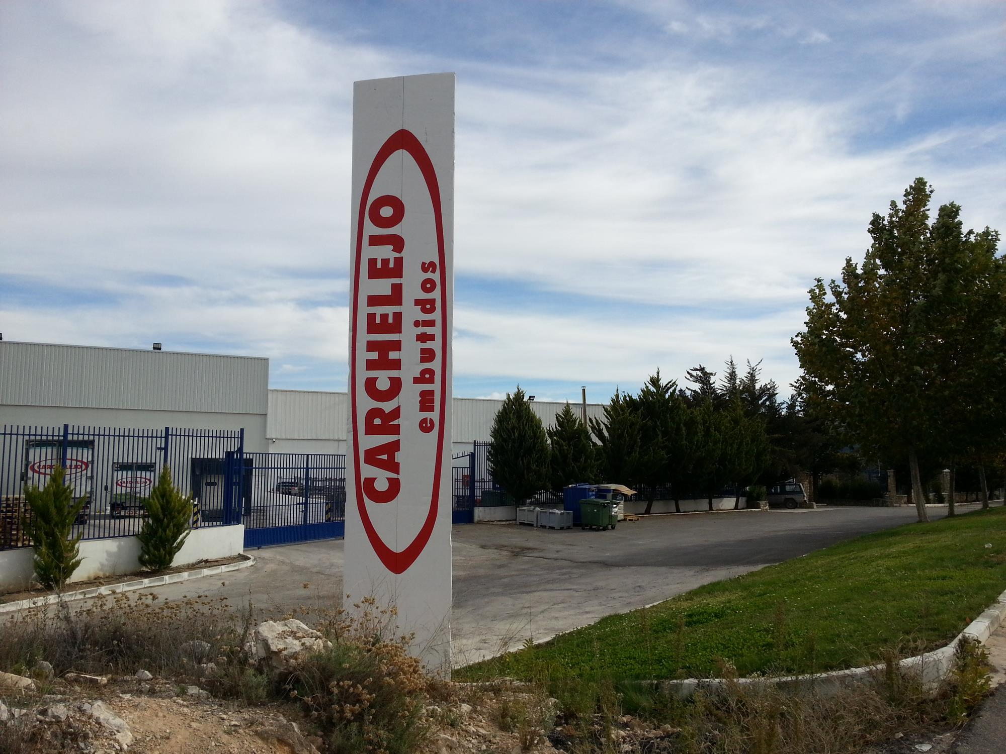 Fábrica de embutidos en Carchelejo.